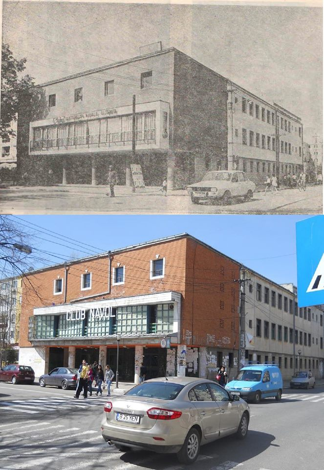 Clubul SNO, anii '70 vs prezent